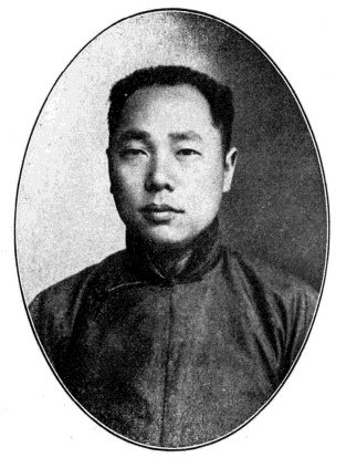 中華民國國會議員